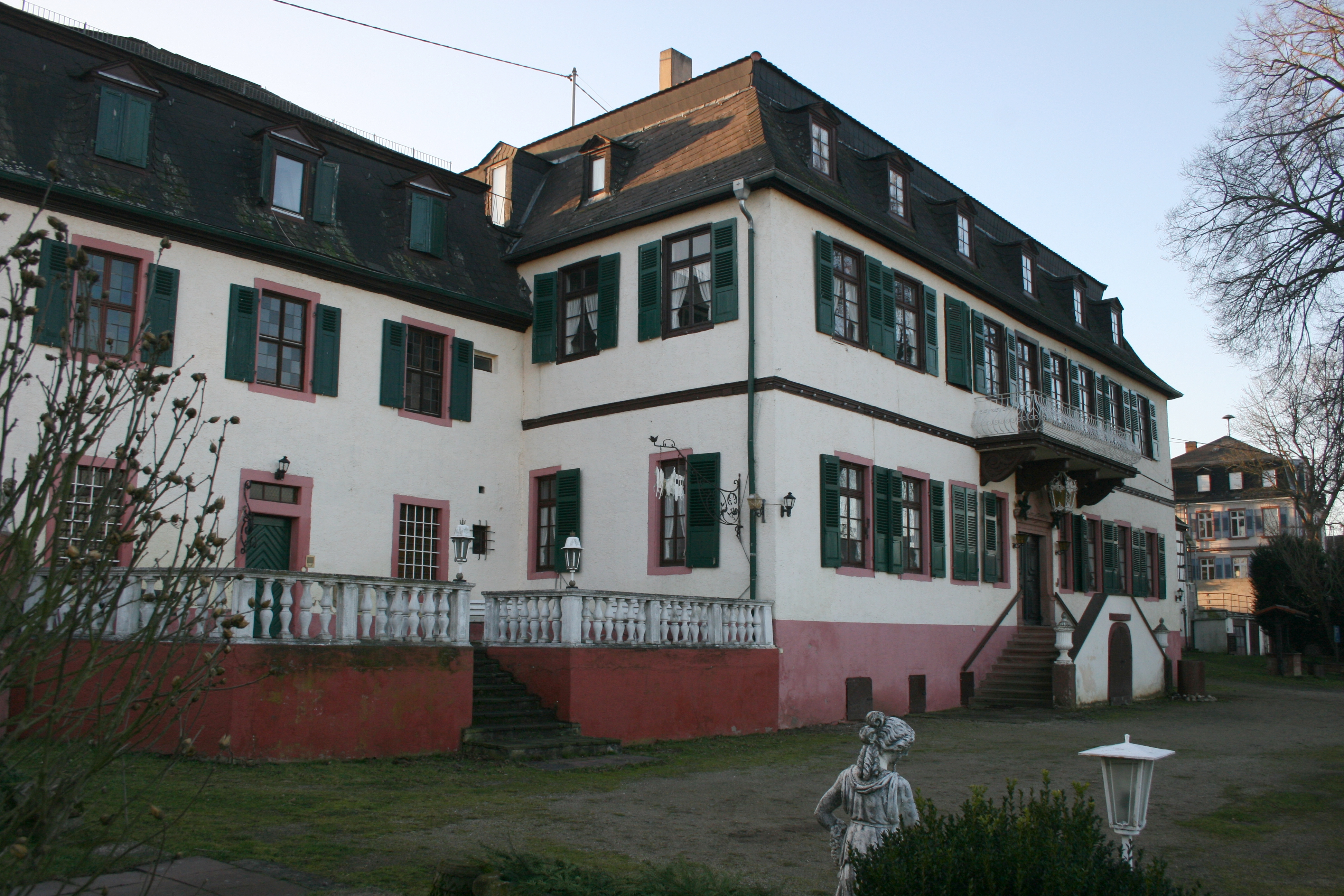 Schloss Günderrode in Höchst an der Nidder, Gemeinde Altenstadt, Wetteraukreis.